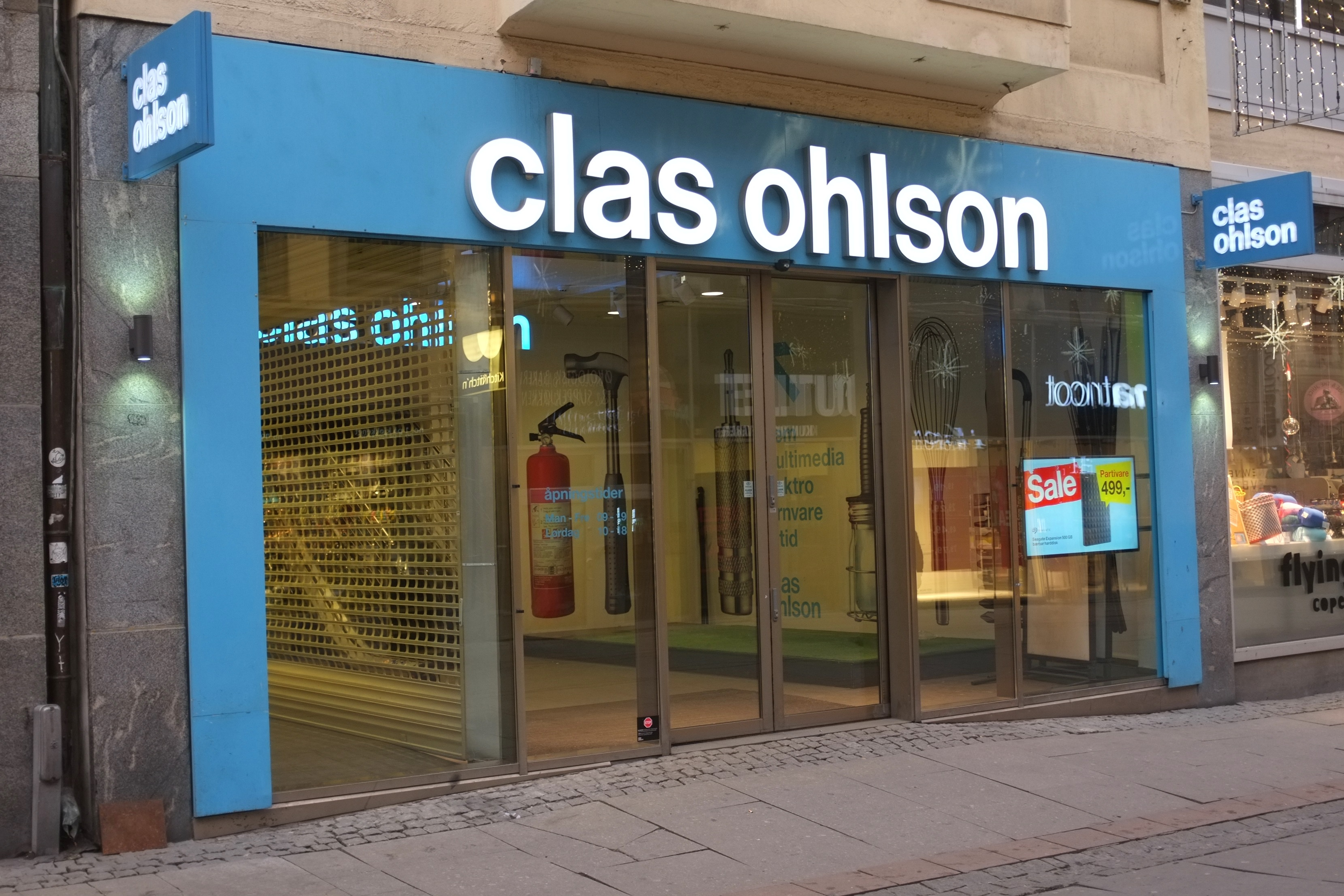 Clas Ohlson-butikken i Torggata i Oslo.